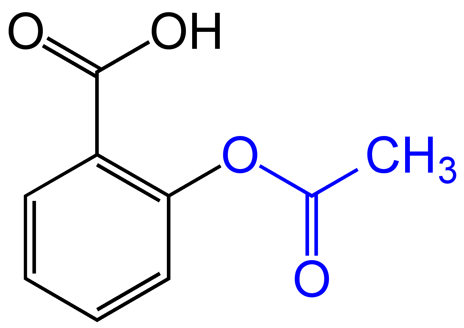 Strukturformel mit kolorierter Acyloxygruppe